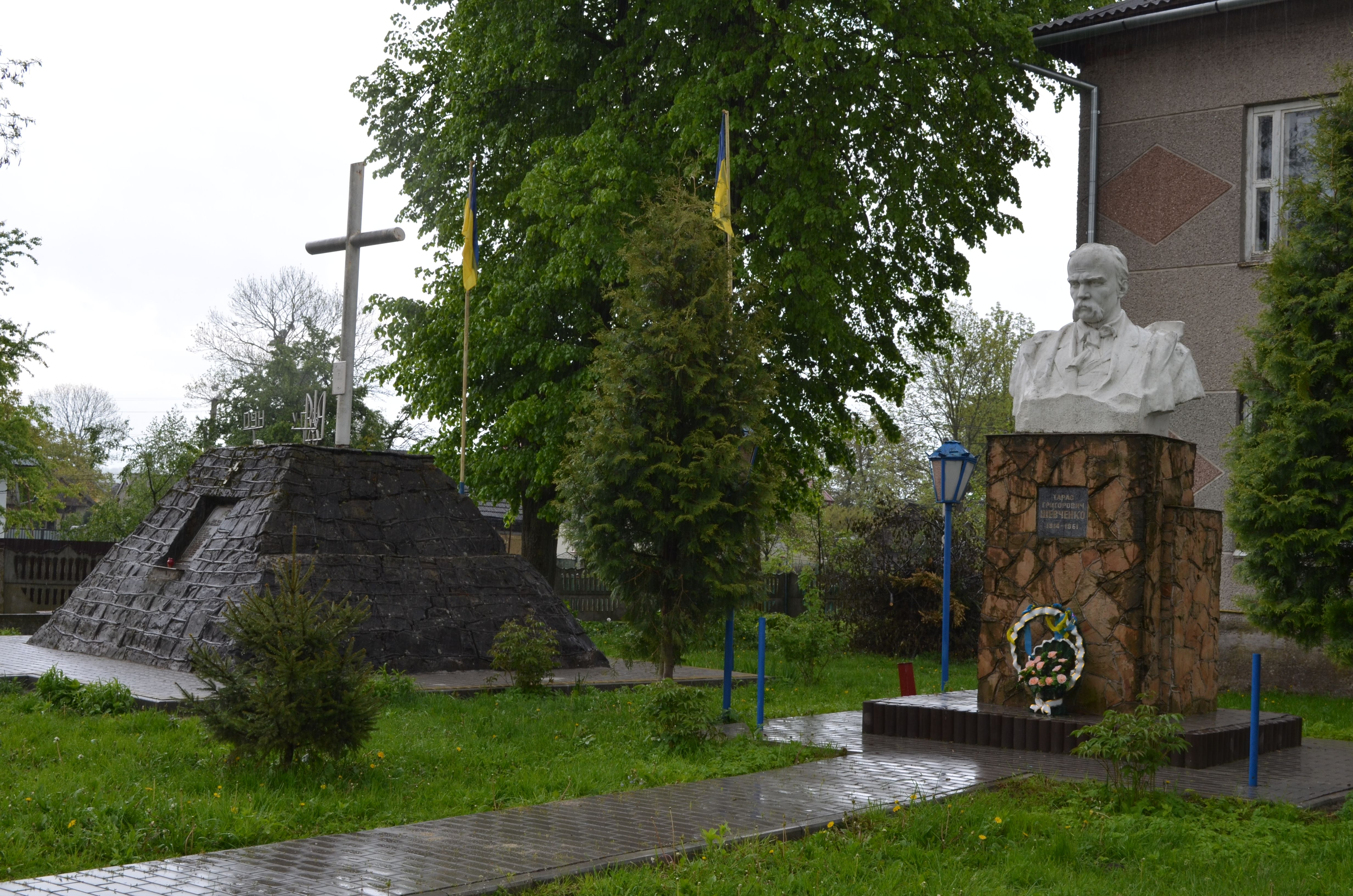 Пам’ятник Шевченку Т.Г., українському поету і художнику (ск. В.Сколоздра, арх. Я.Микула, 1963, мармурова крихта), с.Пісочна, вул.Шевченка